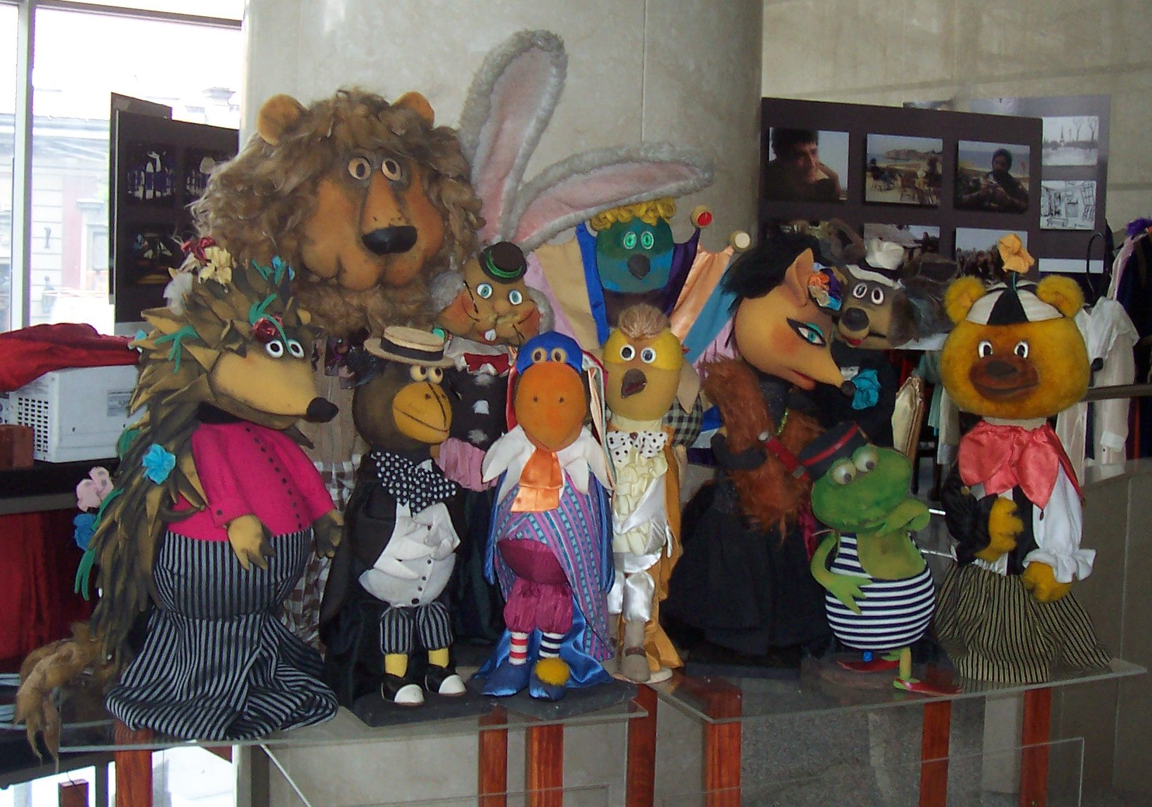 Лутке из емисије "Лаку ноћ, децо". Снимљене на изложби у РТС-у.